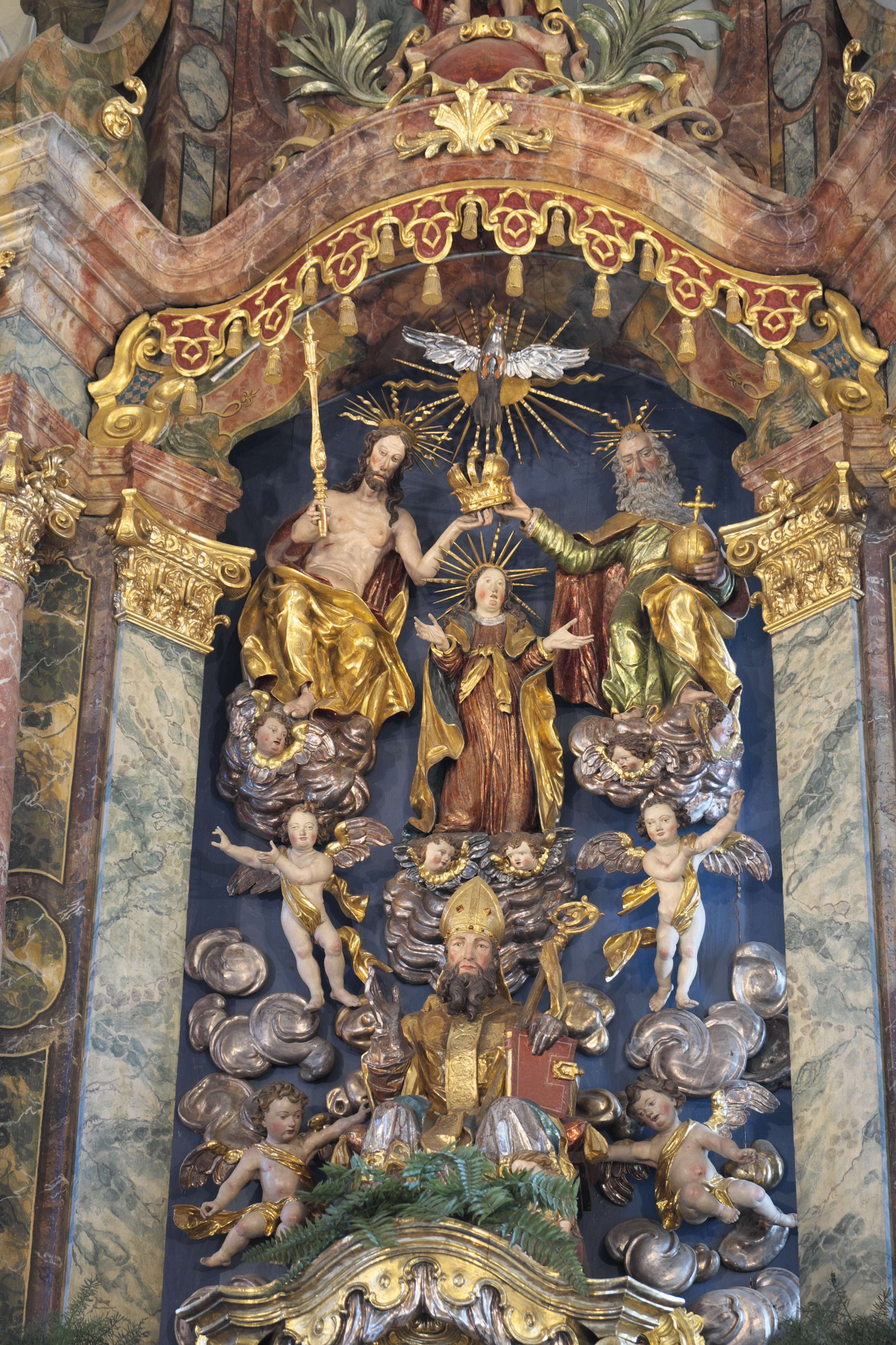 Katholische Pfarrkirche St. Valentin in Unterföhring im Landkreis München (Bayern/Deutschland), Hauptaltar von 1741, Figurengruppe der Marienkrönung von 1650/60